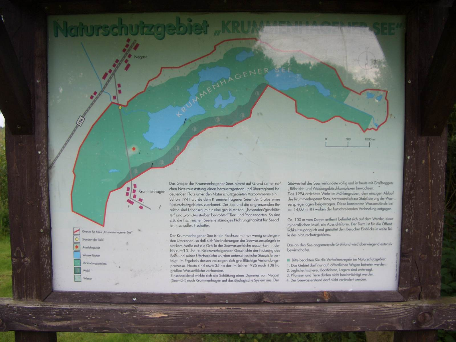 Infotafel zum Naturschutzgebiet Krummenhagener See